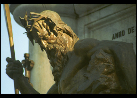 Netuno, detalhe do monumento da Independência da Bahia na Praça do Campo Grande, Salvador, Bahia, Brasil. Neptune, detail of the monument of the Bahia Independence in the Square of the Campo Grande, Salvador, Bahia, Brazil.